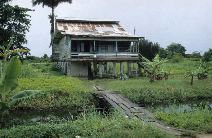 Dia. Hoewel verschillende cultures werden onderhouden in Suriname, was suiker (suikerriet, Saccharum officinarum) een van de meest winstgevende plantagegewassen. Suikerriet werd in 1640 in Suriname ingevoerd en was vanaf 1700 op plantages in cultuur. Suiker was lange tijd het belangrijkste exportprodukt van Suriname. Als er over de slavernij in Suriname wordt gesproken, wordt de zin: "Hoe duur was de suiker?" dan ook vaak gebruikt, verwijzend naar de zware levens van de slaven. Later werden contractarbeiders uit India en het toenmalige Nederlands-Indie ingescheept, die voor een karig loon verder werkten op de plantages. Tegenwoordig zijn er geen suikerplantages meer in bedrijf in Suriname.. Oude woningen op plantage Mariënburg